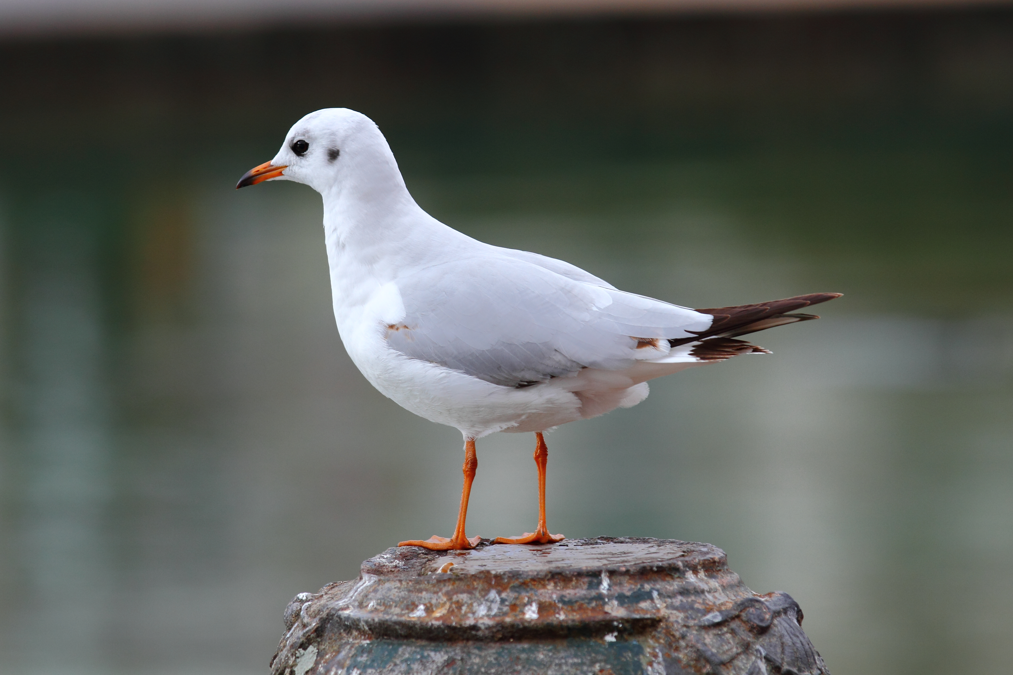 Mouette rieuse (Larus ridibundus) aux bords du Lac d'Annecy